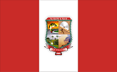 Bandeira do Município de São Sebastião do Uatumã, Criada por Jean Itamar Nogueira da Silva, em 18 de março de 2008 e aprovada a partir da presente data pelos poderes Parlamentar e Executivo do município.